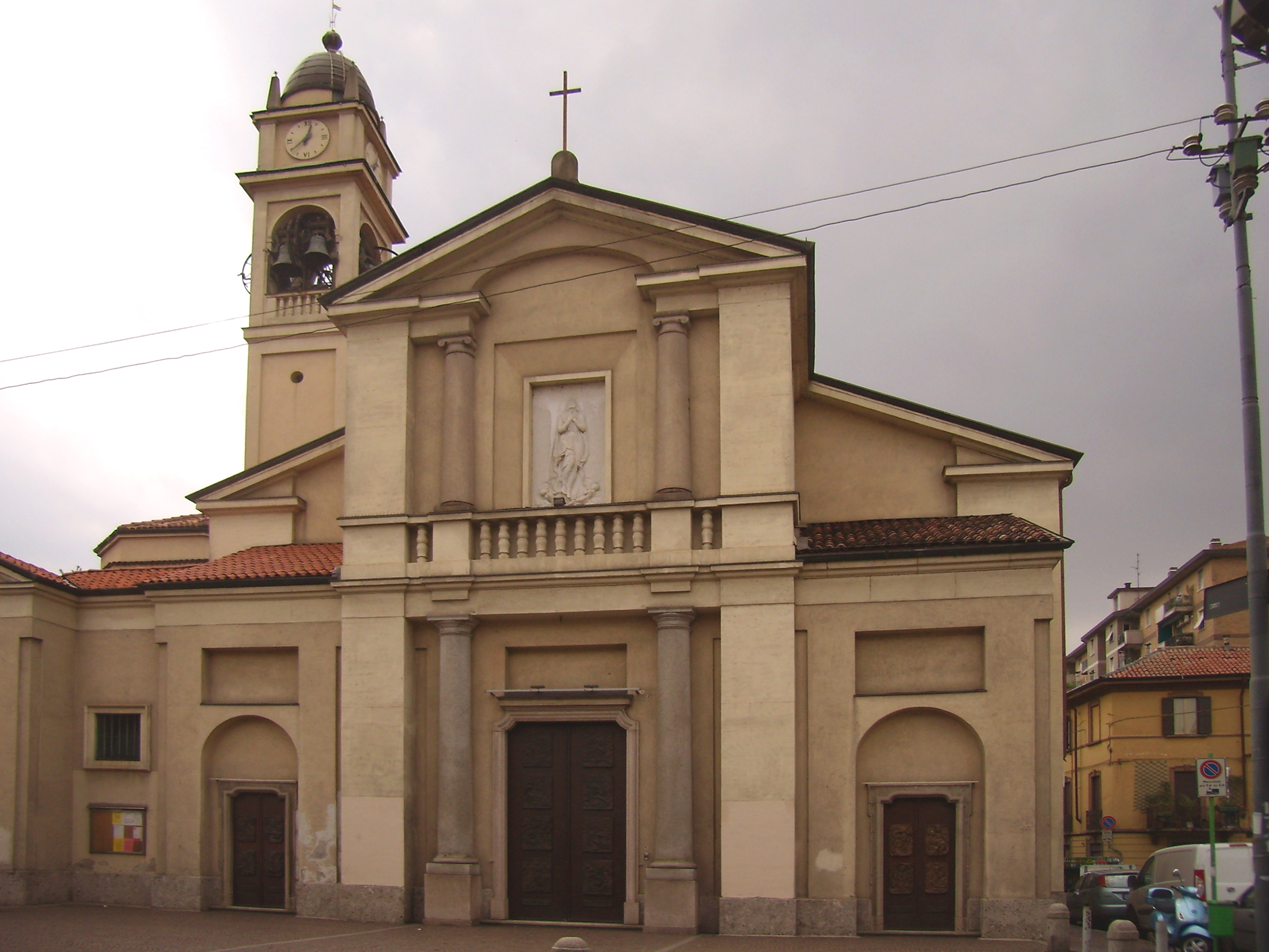 Milano, chiesa parrocchiale della Beata Vergine Assunta in Bruzzano.